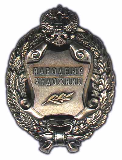 Народный художник Российской Федерации. Нагрудный знак.